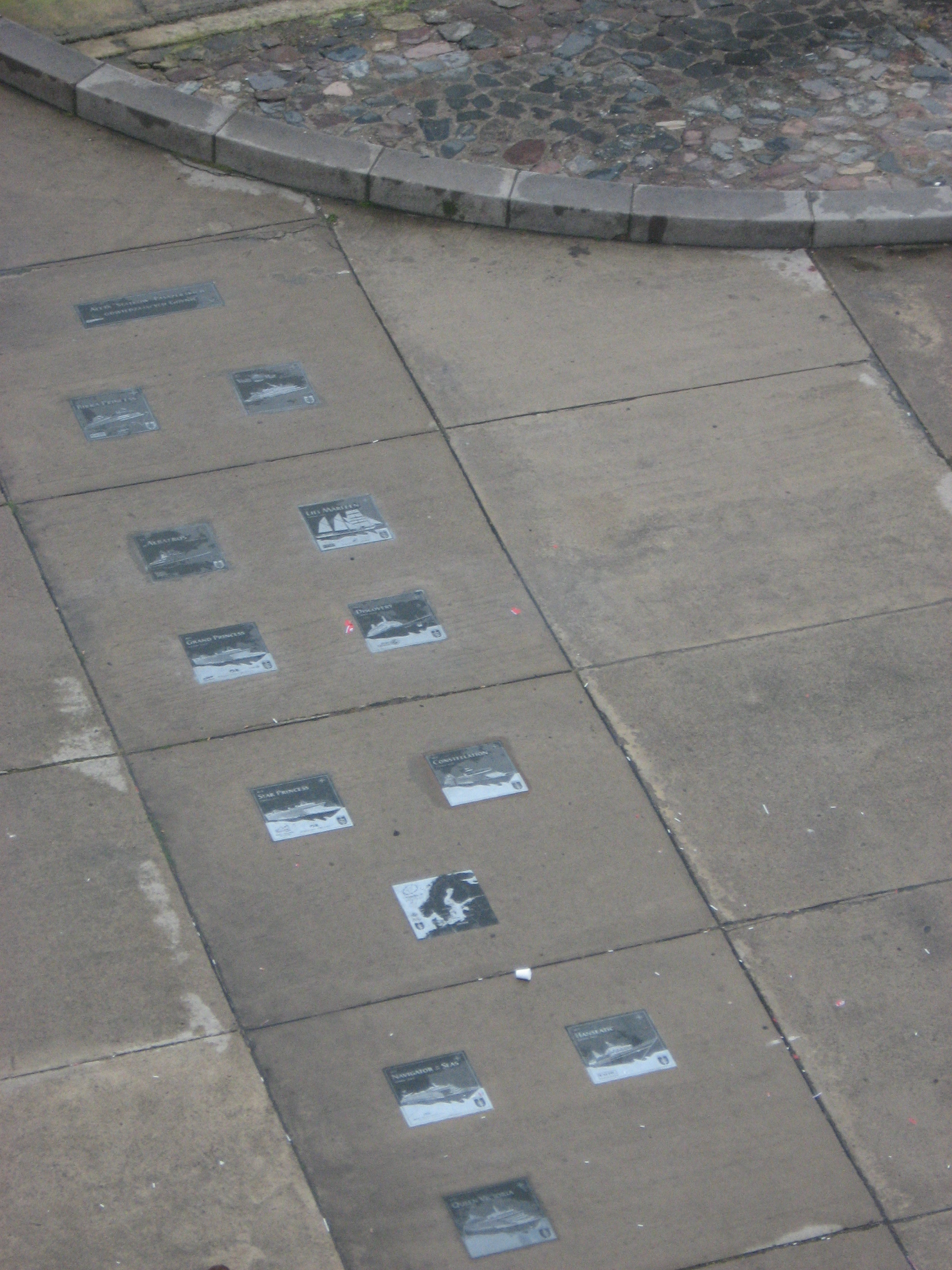 Aleja Statków Pasażerskich w Gdyni, widok na wszystkie tablice z pokładu MF Stena Baltica